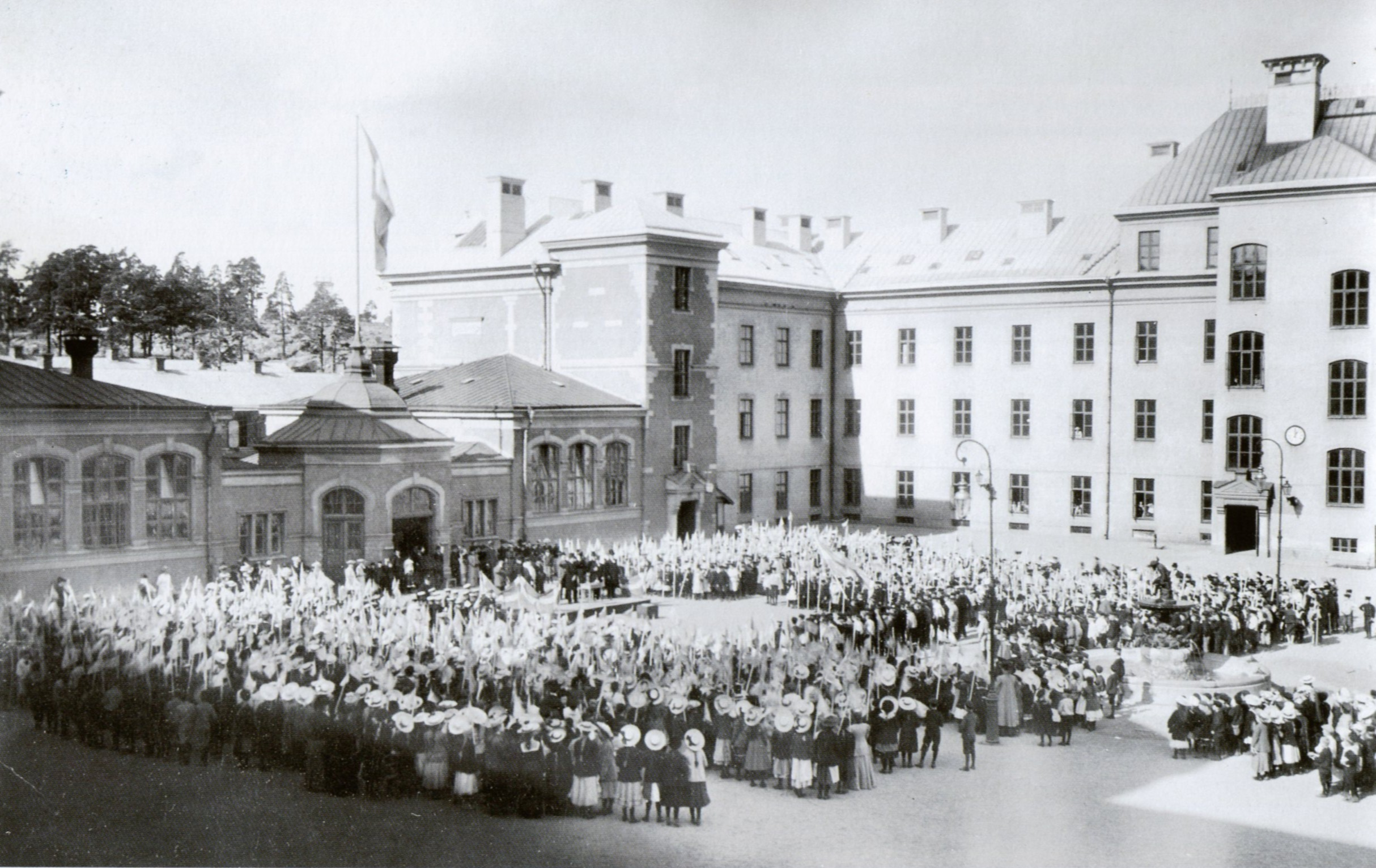 Kungsholms folkskola, skolgården från söder